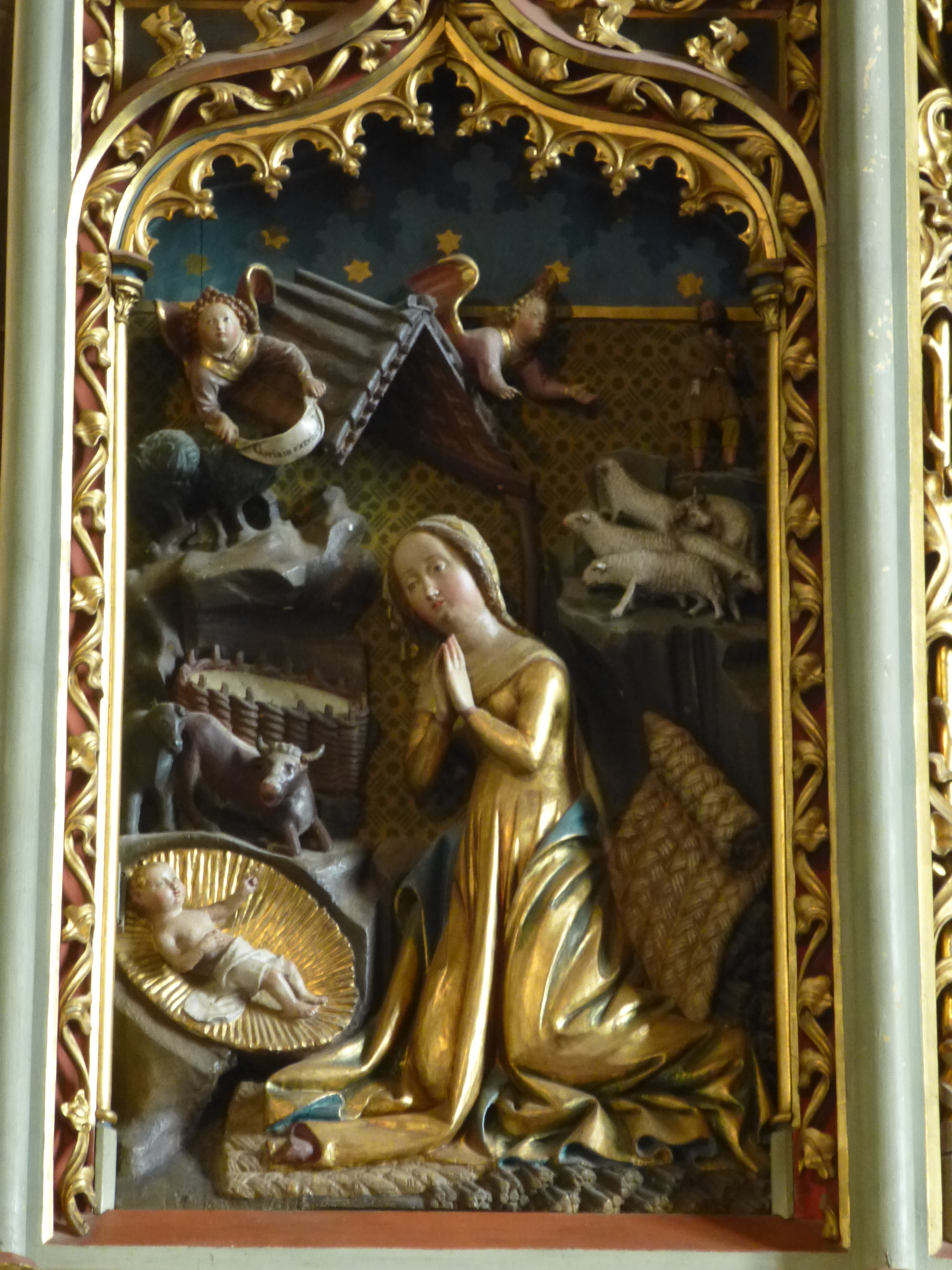 Detail des Hochaltars in der Deutschnofner Pfarrkirche St. Ulrich und Wolfgang